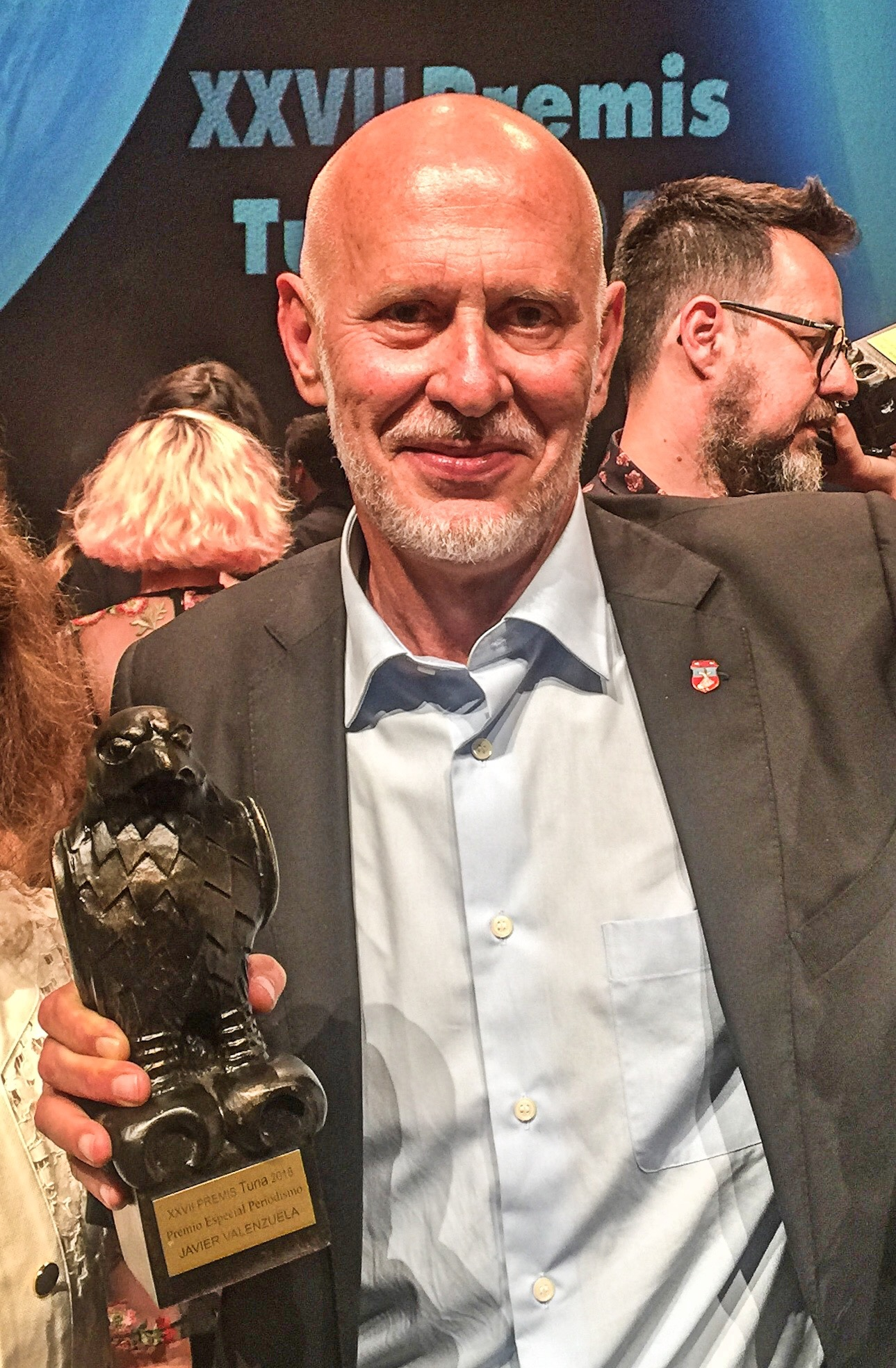 Javier Valenzuela recibe el Premio de Periodismo Turia en Valencia, el 7 de julio de 2018